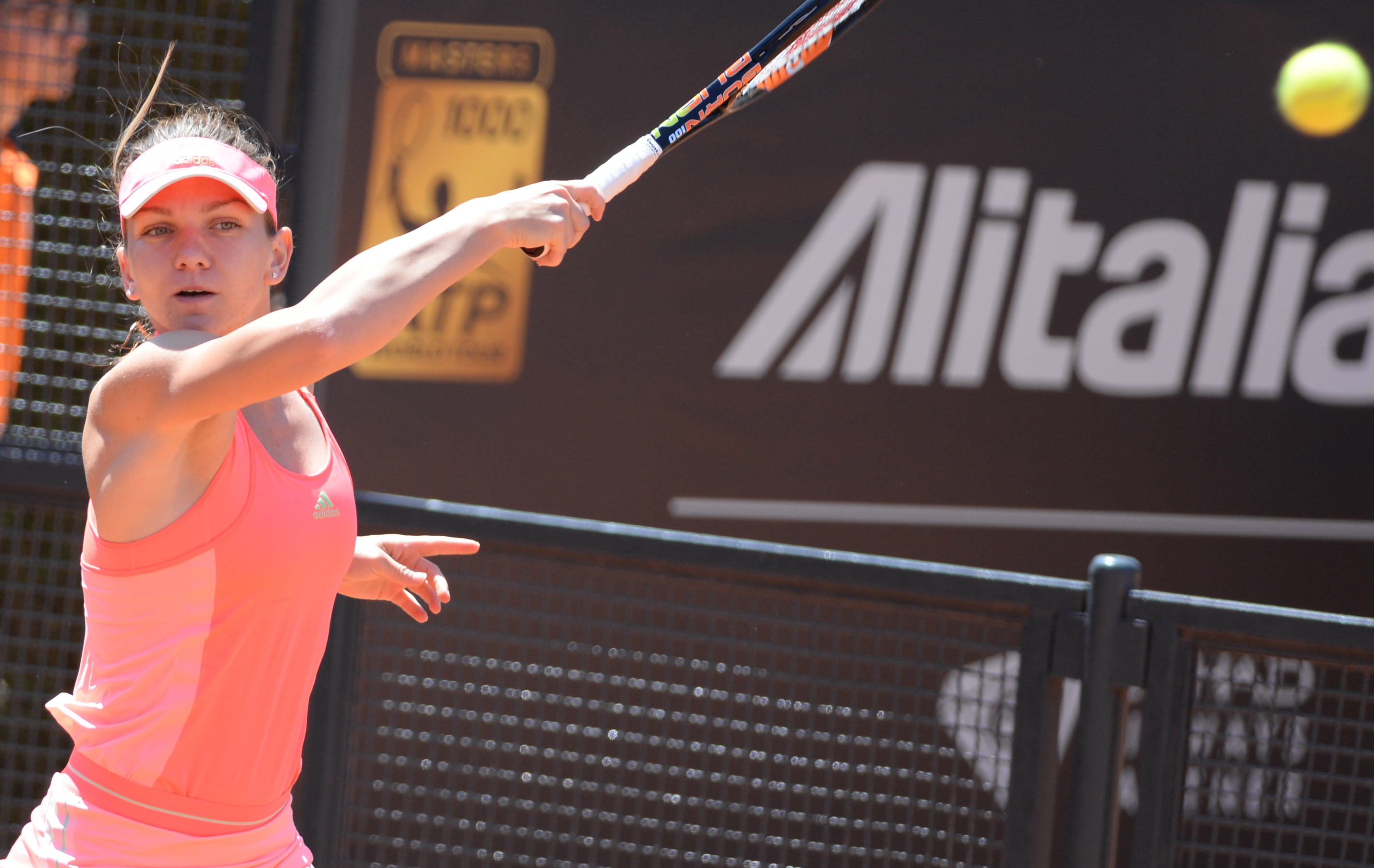 Simona Halep